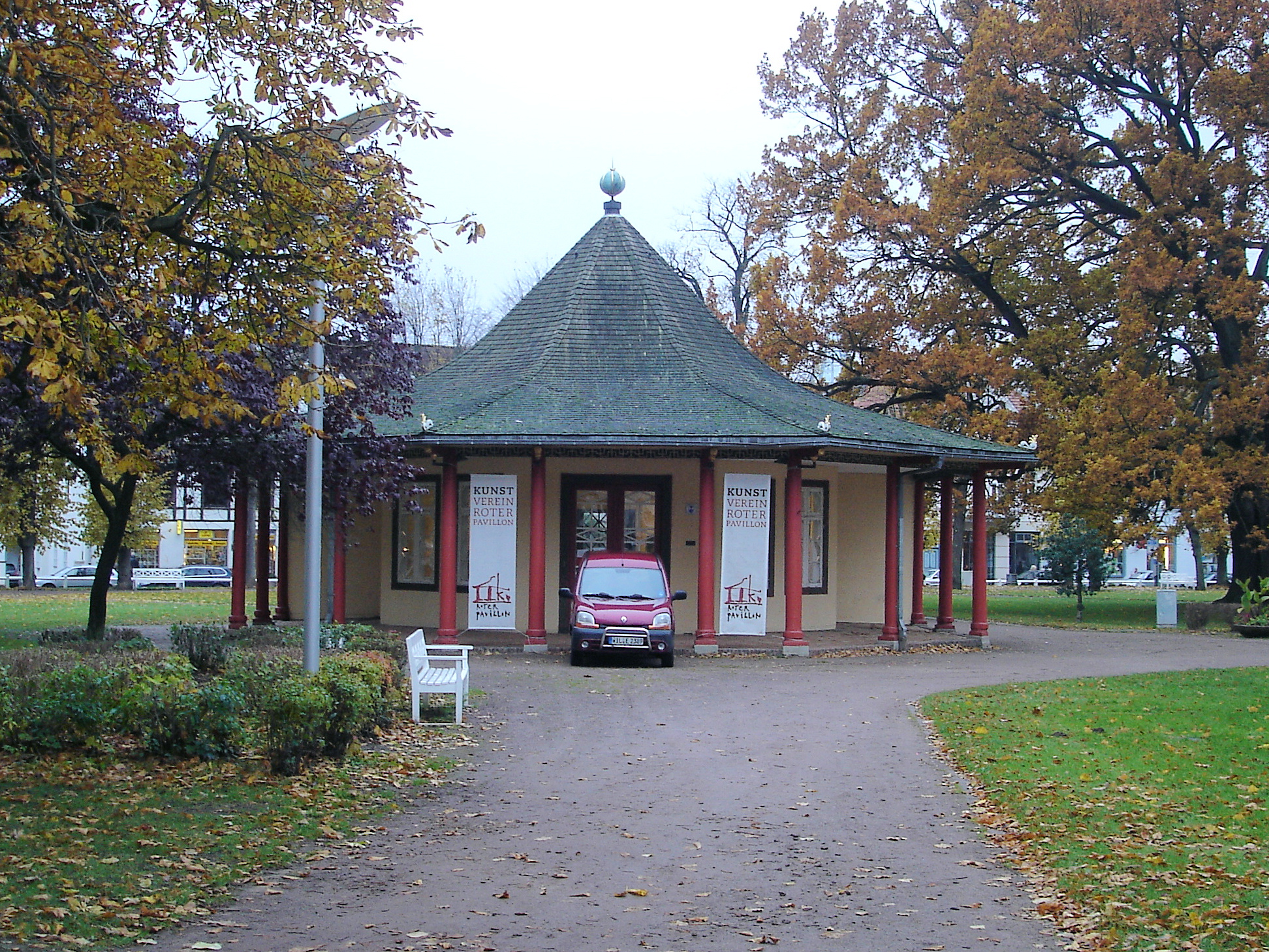 Roter Pavillon auf dem Kamp in Bad Doberan, Landkreis Bad Doberan, Mecklenburg-Vorpommern